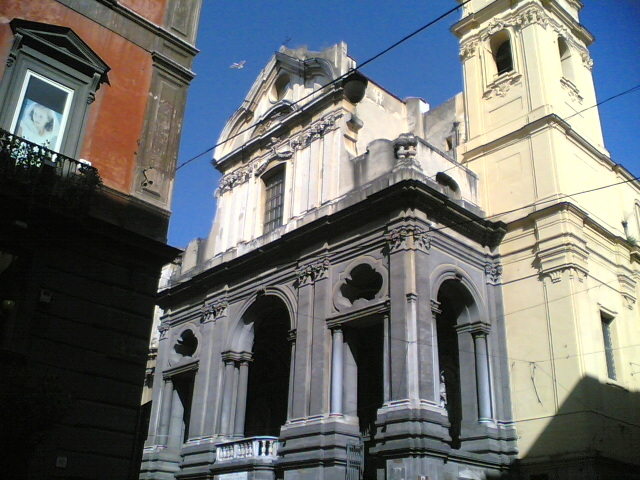 Facciata San Giuseppe dei Ruffi, Napoli